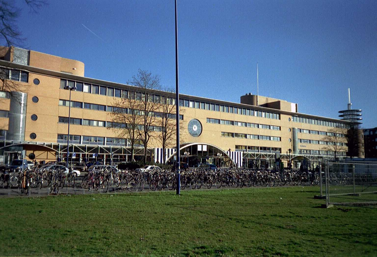 Voorzijde NS-station Hilversum. Foto genomen op 7 dec. 2003 en geüpload door maker.